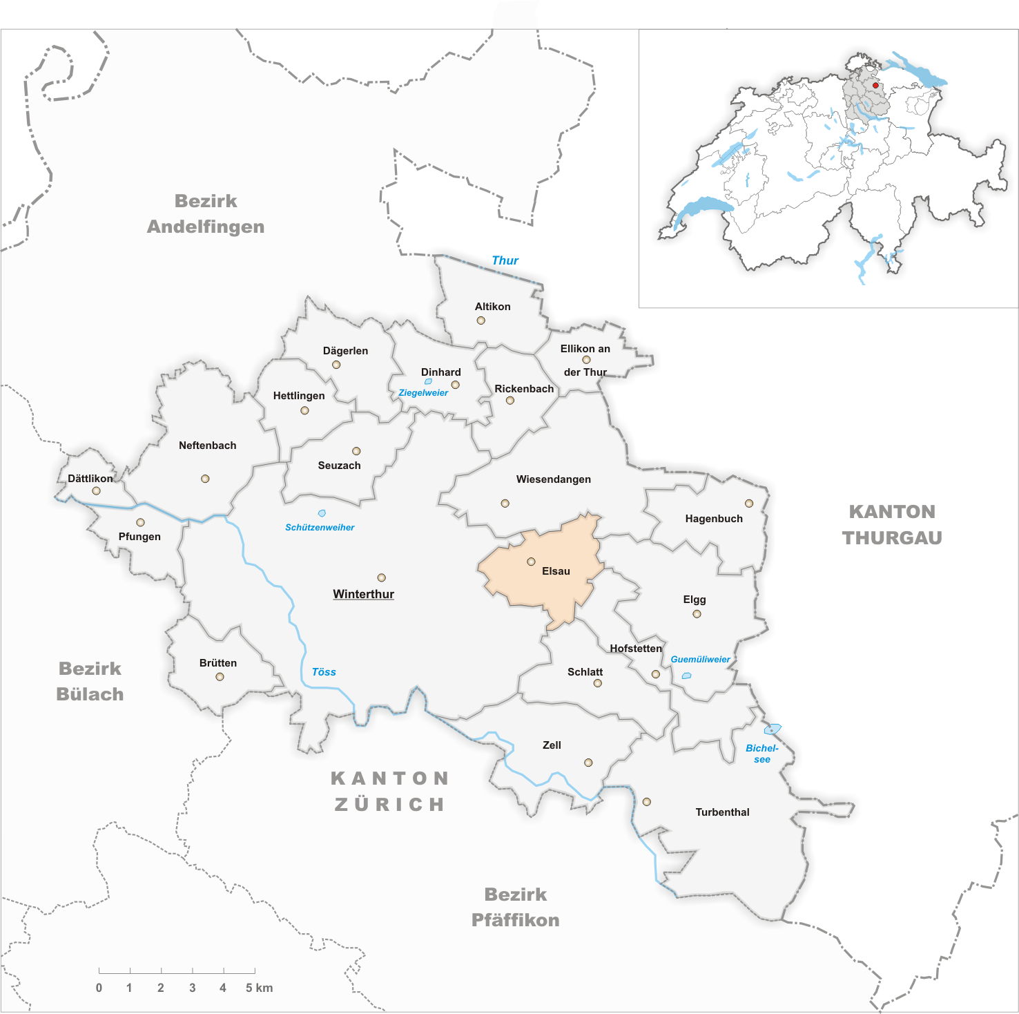 Municipality Elsau